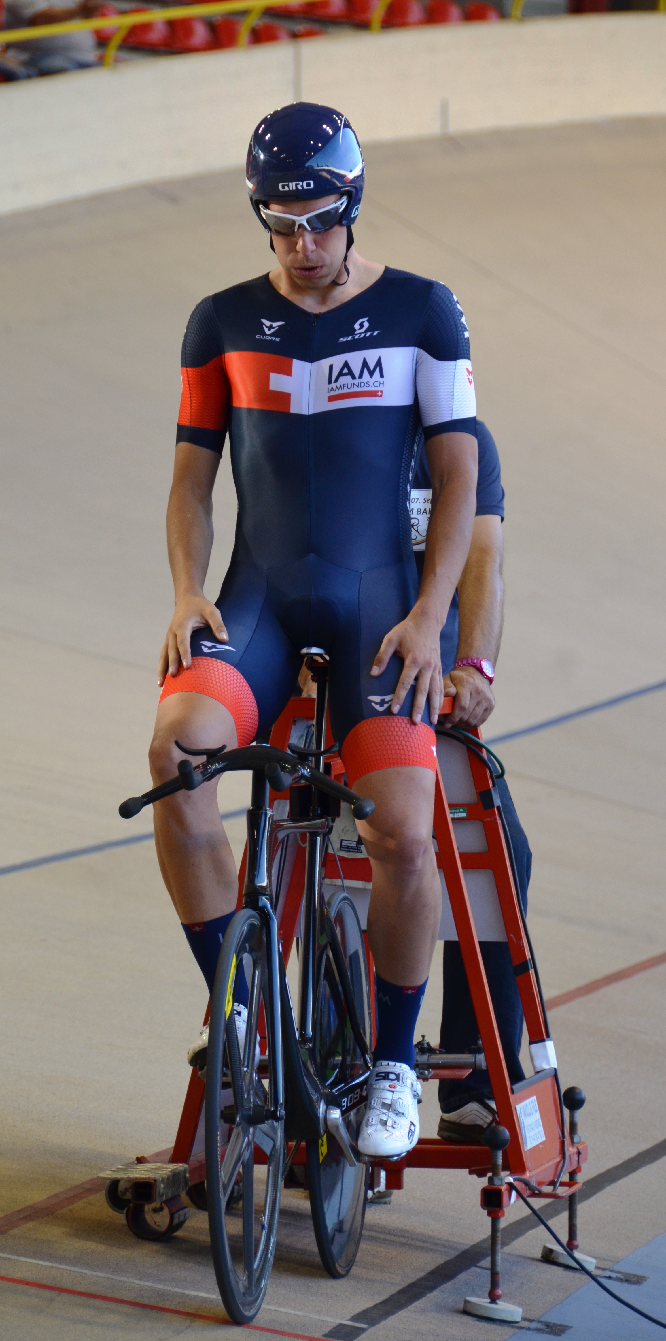 Roger Kluge, deutscher Radsportler The making of this document was supported by the Community-Budget of Wikimedia Germany.